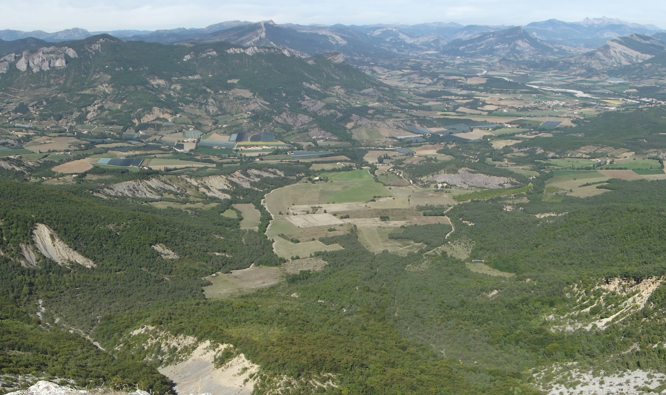 Vue de la commune de Nossage-et-Bénévent depuis la montagne de Chabre. Le territoire communal se termine au niveau du torrent (le Céans) coulant de gauche à droite. A gauche, le haut des falaises d'Orpierre.